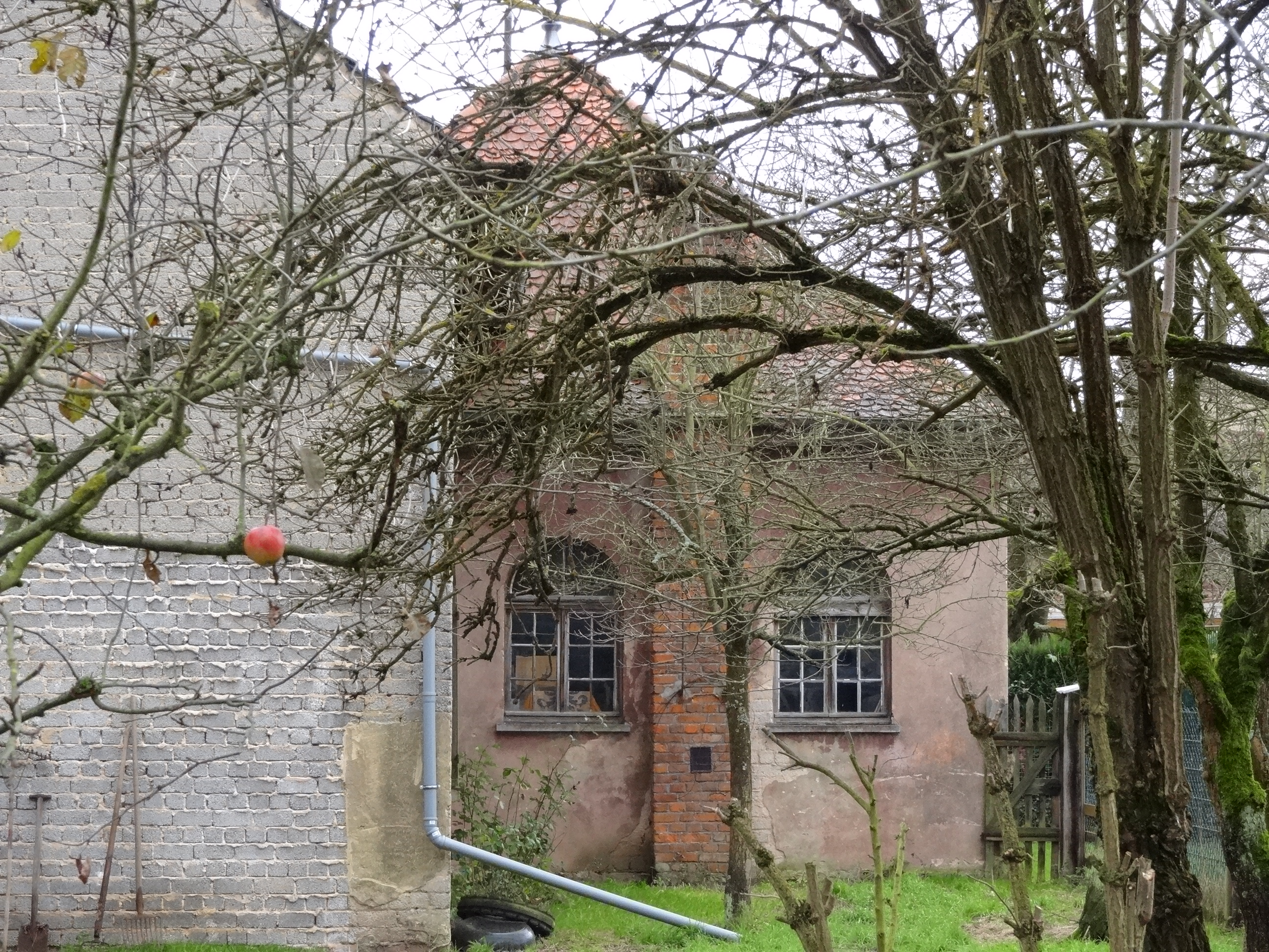 Ehem. Synagoge Pohl-Göns